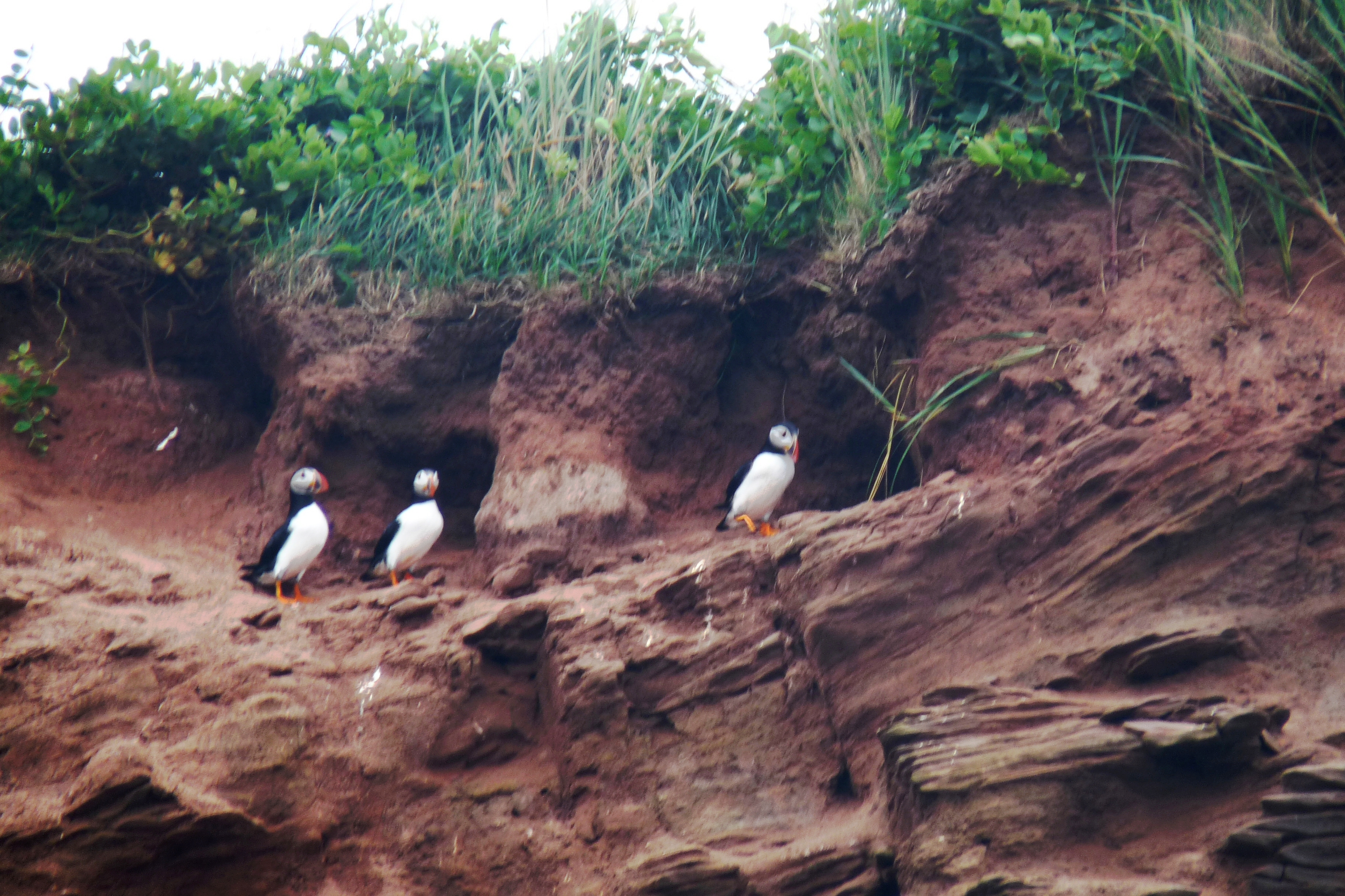 Macareux nichant sur la falaise de l'ile Brion en 2011